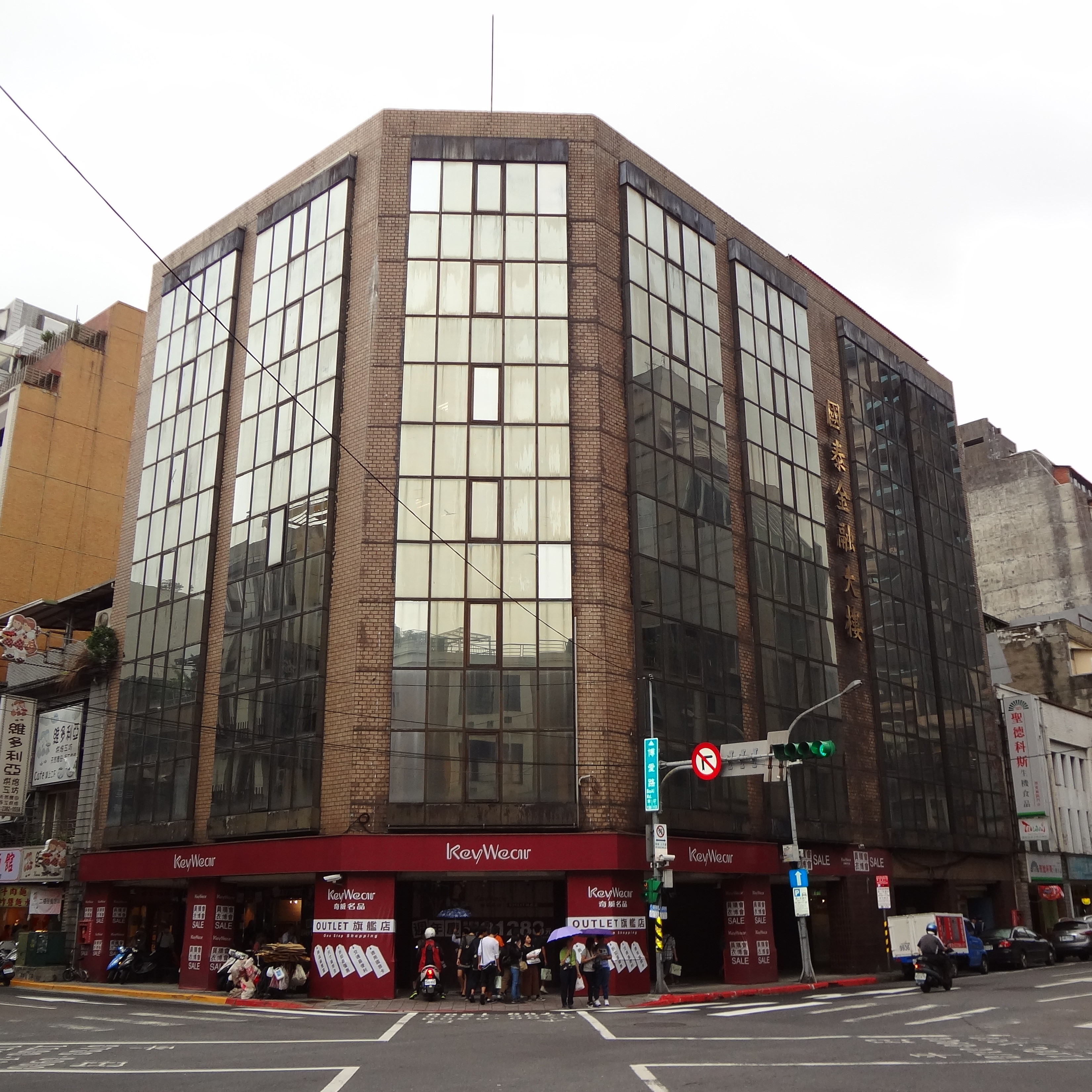 原菊元百貨，位於臺北市中正區博愛路148、150號，現為國泰金融大樓。